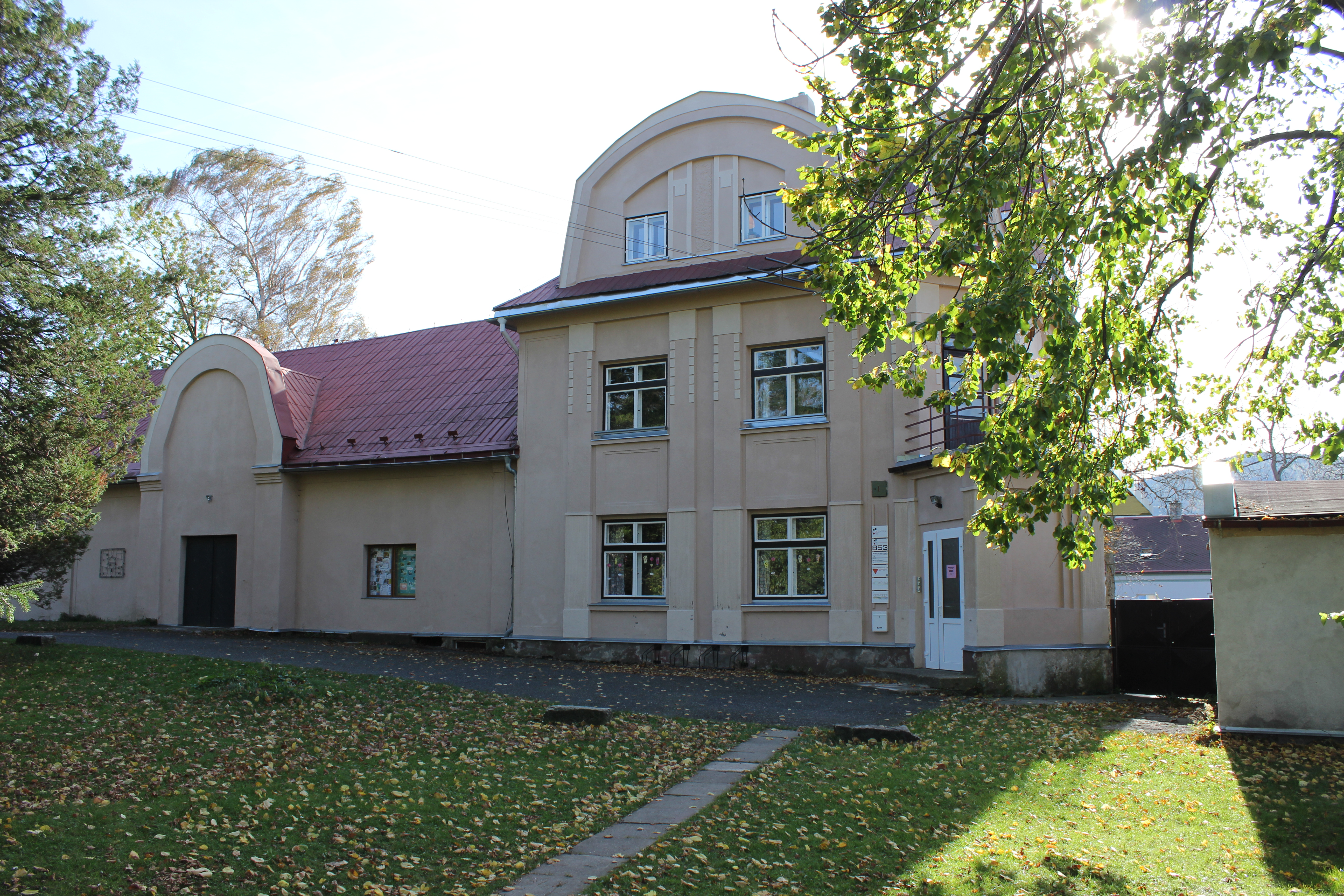 Dům číslo popisné 853 ve Ševrmově ulici (modlitebna Jednoty bratrské) v Novém Městě pod Smrkem.